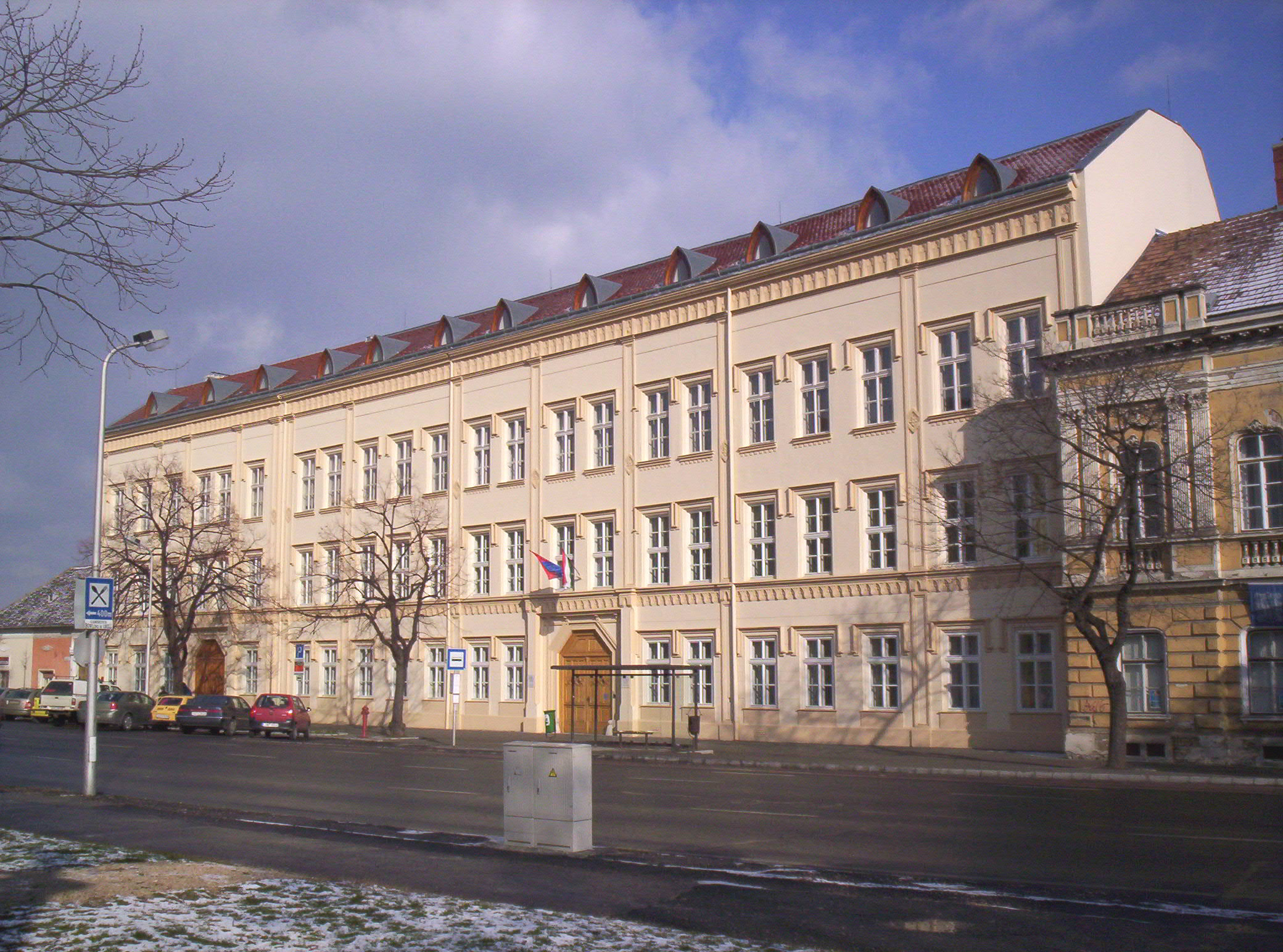 Theology Academy of Pápa Reformed College of the Március 15 square, formerly women's boarding-school called "Nátus". A "Nátus" a pápai Március 15. téren, ma a Pápai Református Teológiai Akadémia épülete, korábban Református Nőnevelő Intézet.